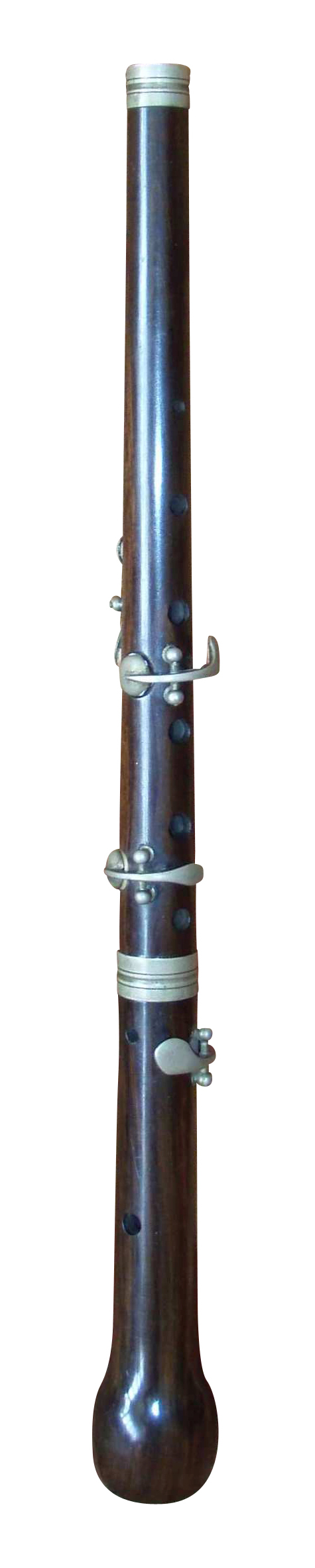 Hautbois musette en bois de rose 1834. Provenance Royaume-uni. Collection privée Dominique Enon.